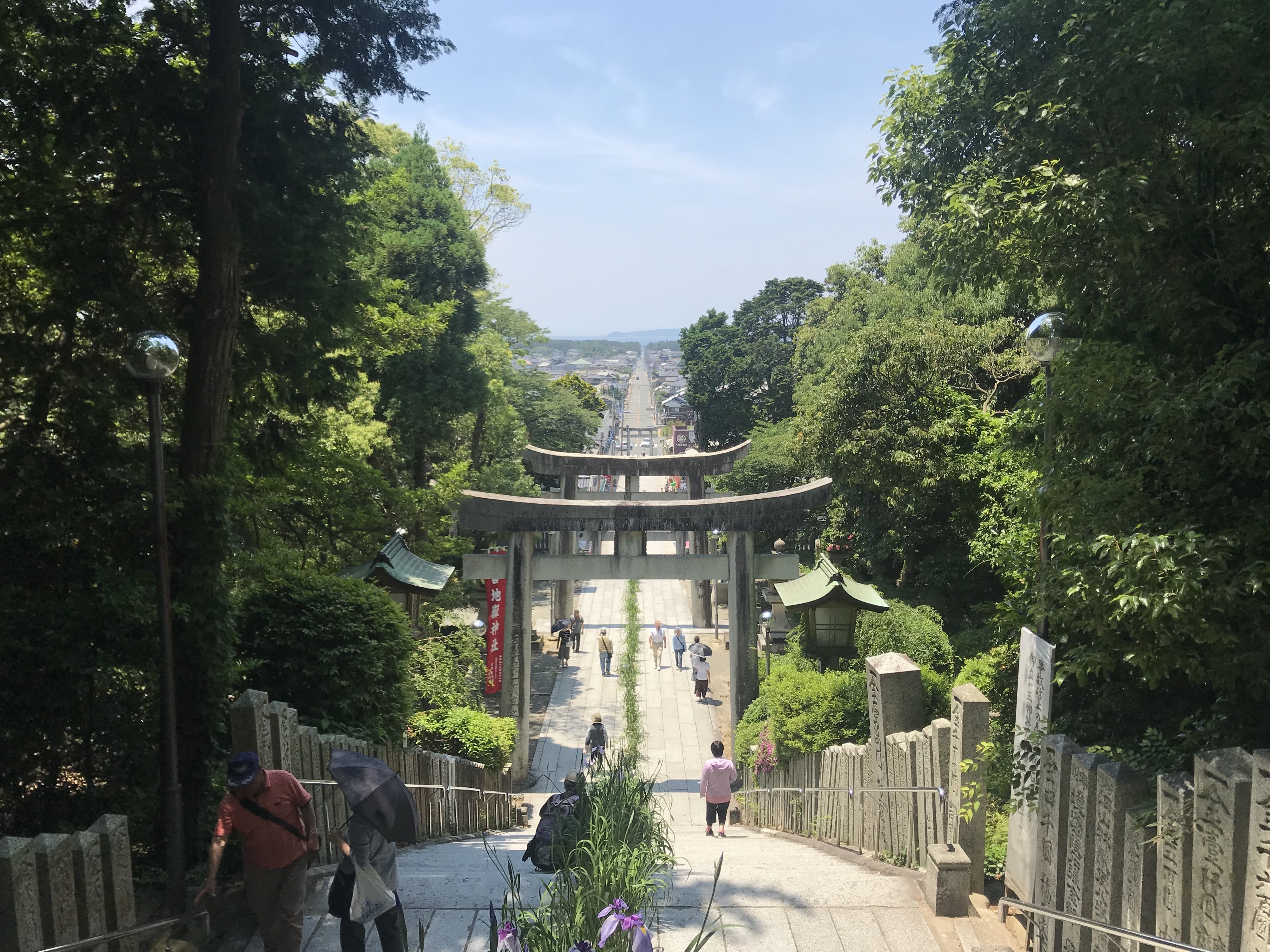 宮地嶽神社・海へ向かう参道